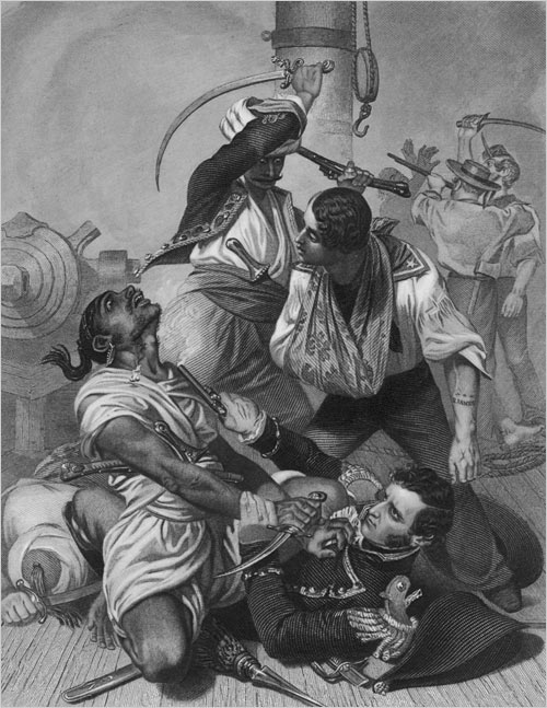 Luta durante uma das Guerras Berberes em 19804